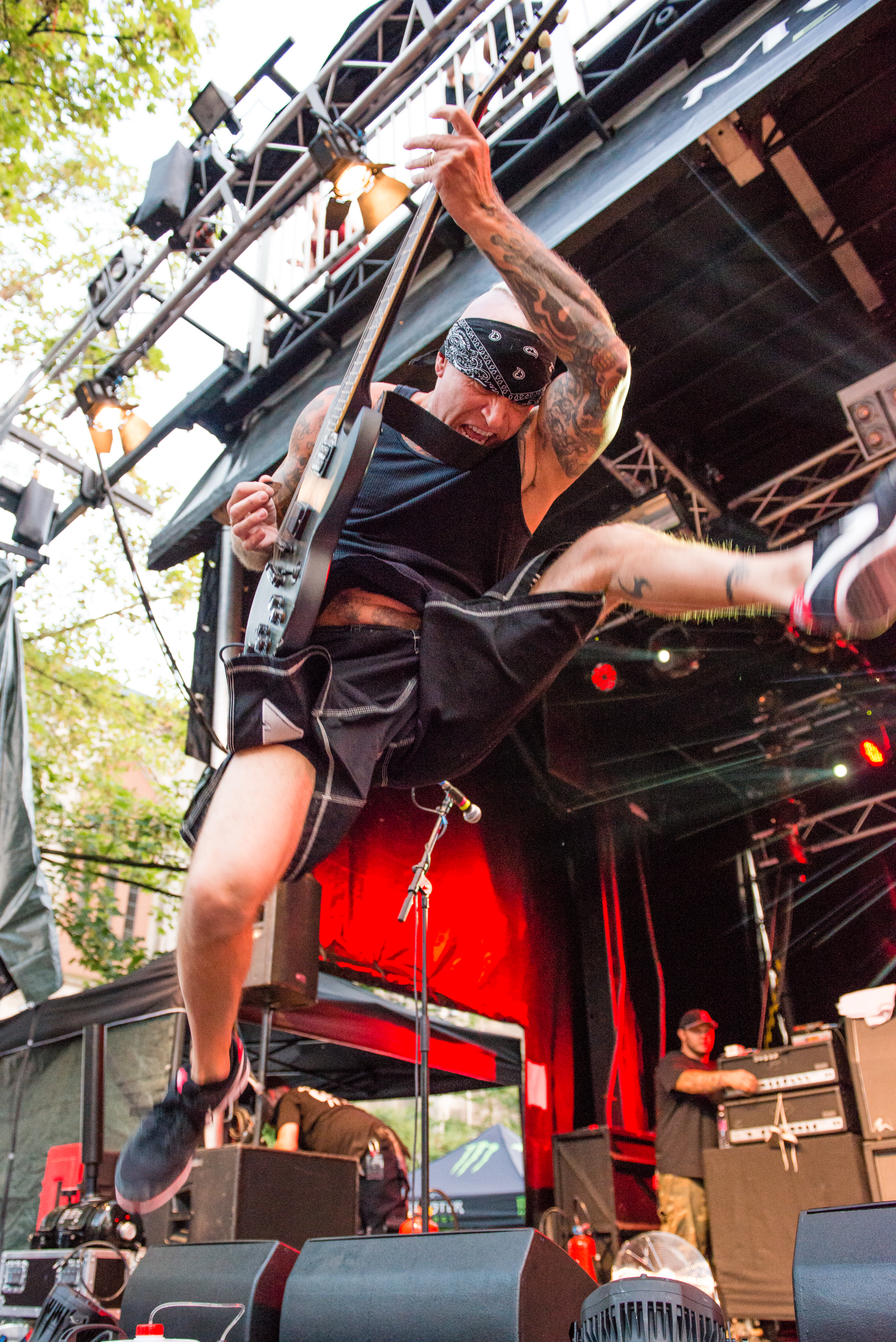 'Nord Open Air 2014 - Essen': 'Sick of it All'